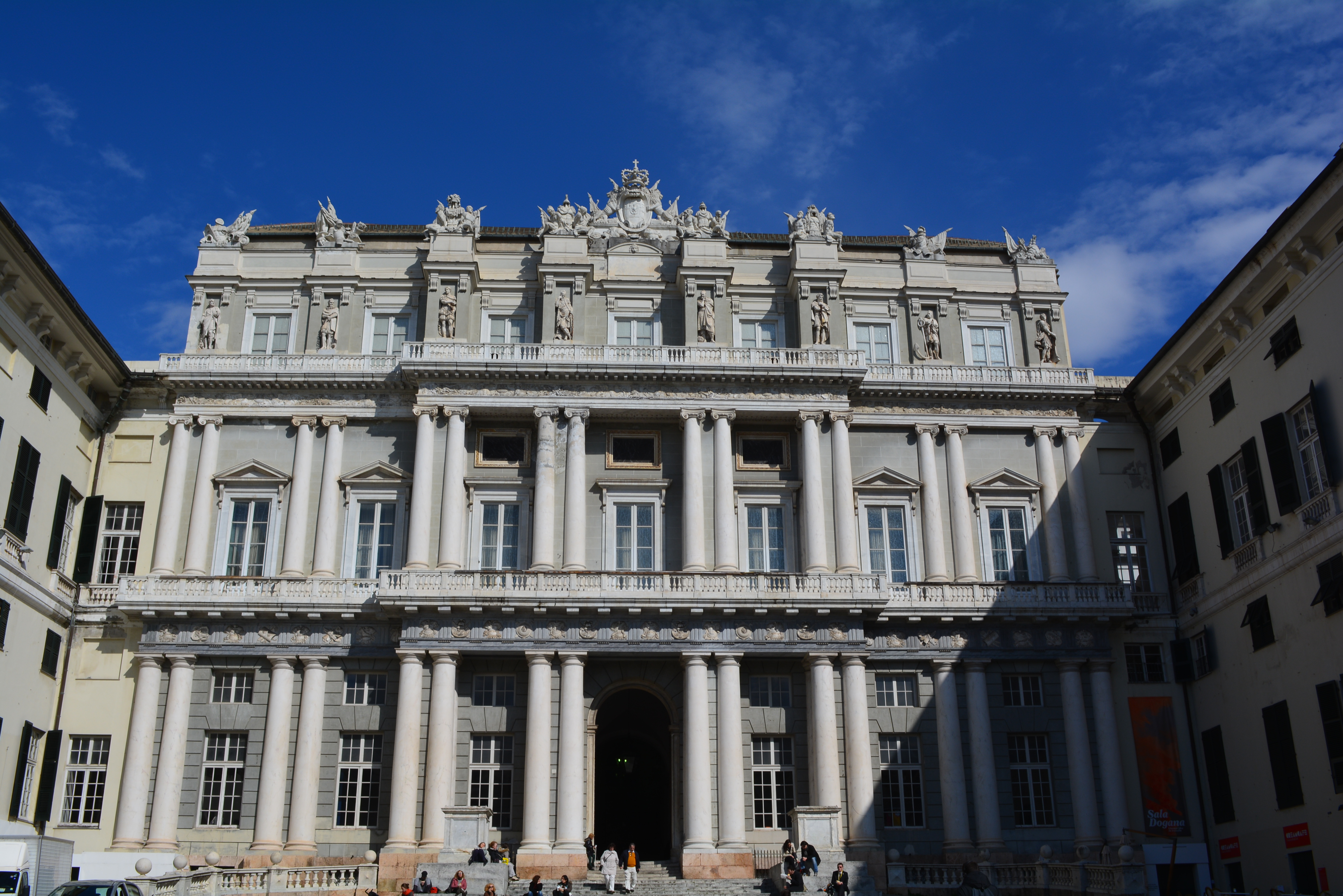 Palazzo Ducale di Genova This is a photo of a monument which is part of cultural heritage of Italy.